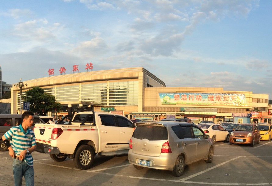 Zhenjiang, Shaoguan, Guangdong, China